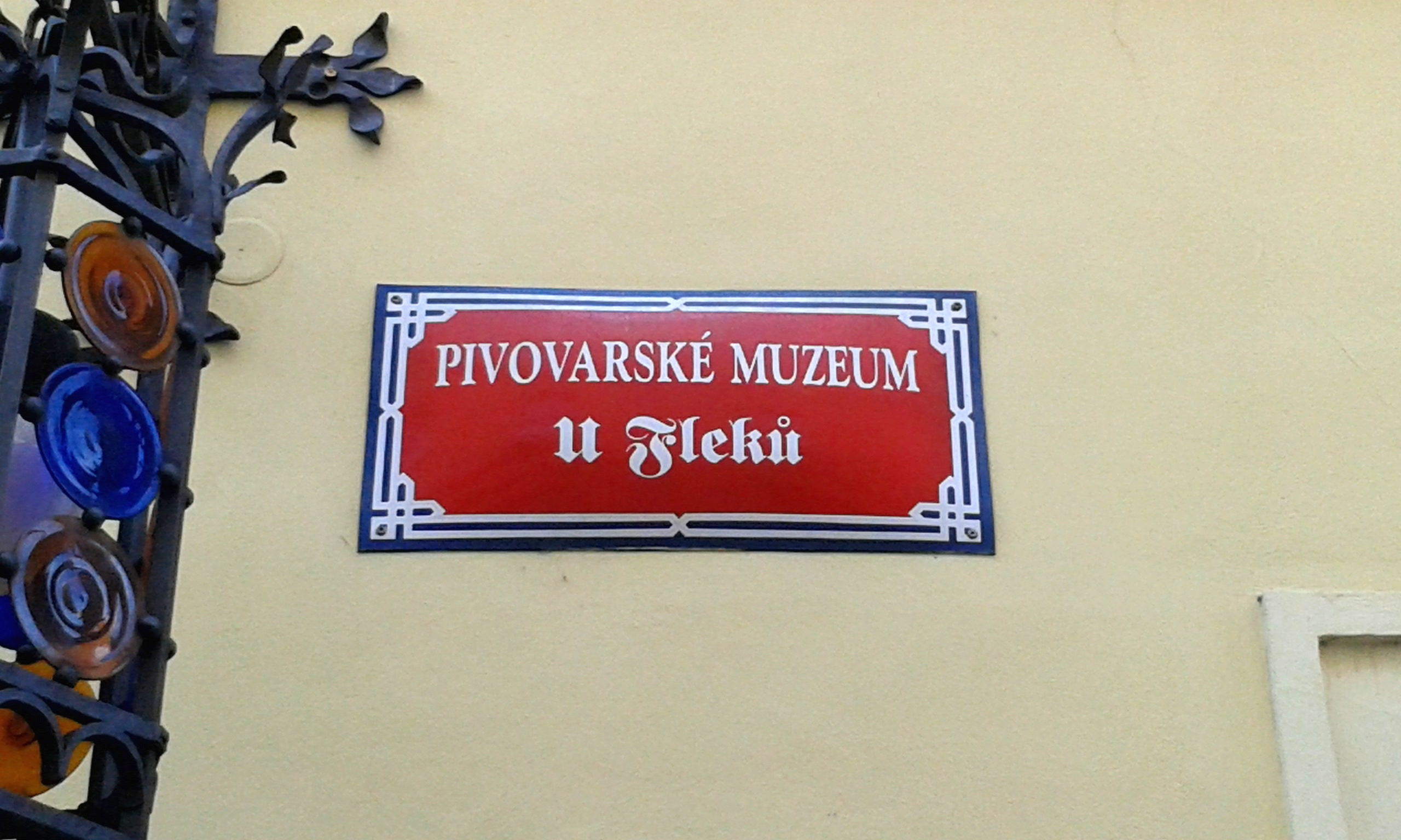 Muzem U Fleků